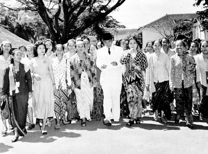 Repronegatief. In juni 1950 organiseerde de leiding van de KOWANI (Kongres Wanita Indonesia) in Djakarta een congres, dat door alle afdelingen in Indonesië werd bijgewoond. Pres. en mevr. Sukarno nodigden de congressisten uit in het Merdeka-paleis.